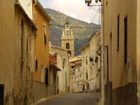 carrer del sol